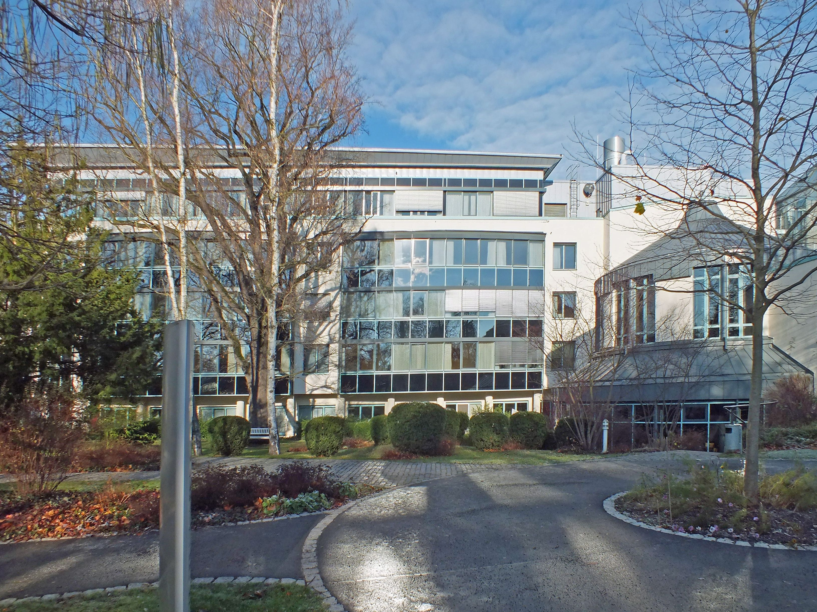 St. Elisabeth-Krankenhaus Leipzig. Neubau (Haus B) von der Gartenseite